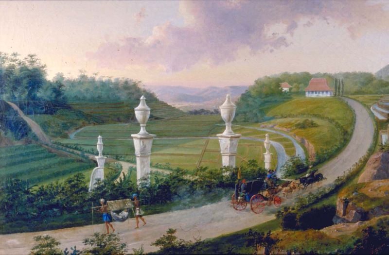 Olieverfschilderij. De grote postweg bij Buitenzorg